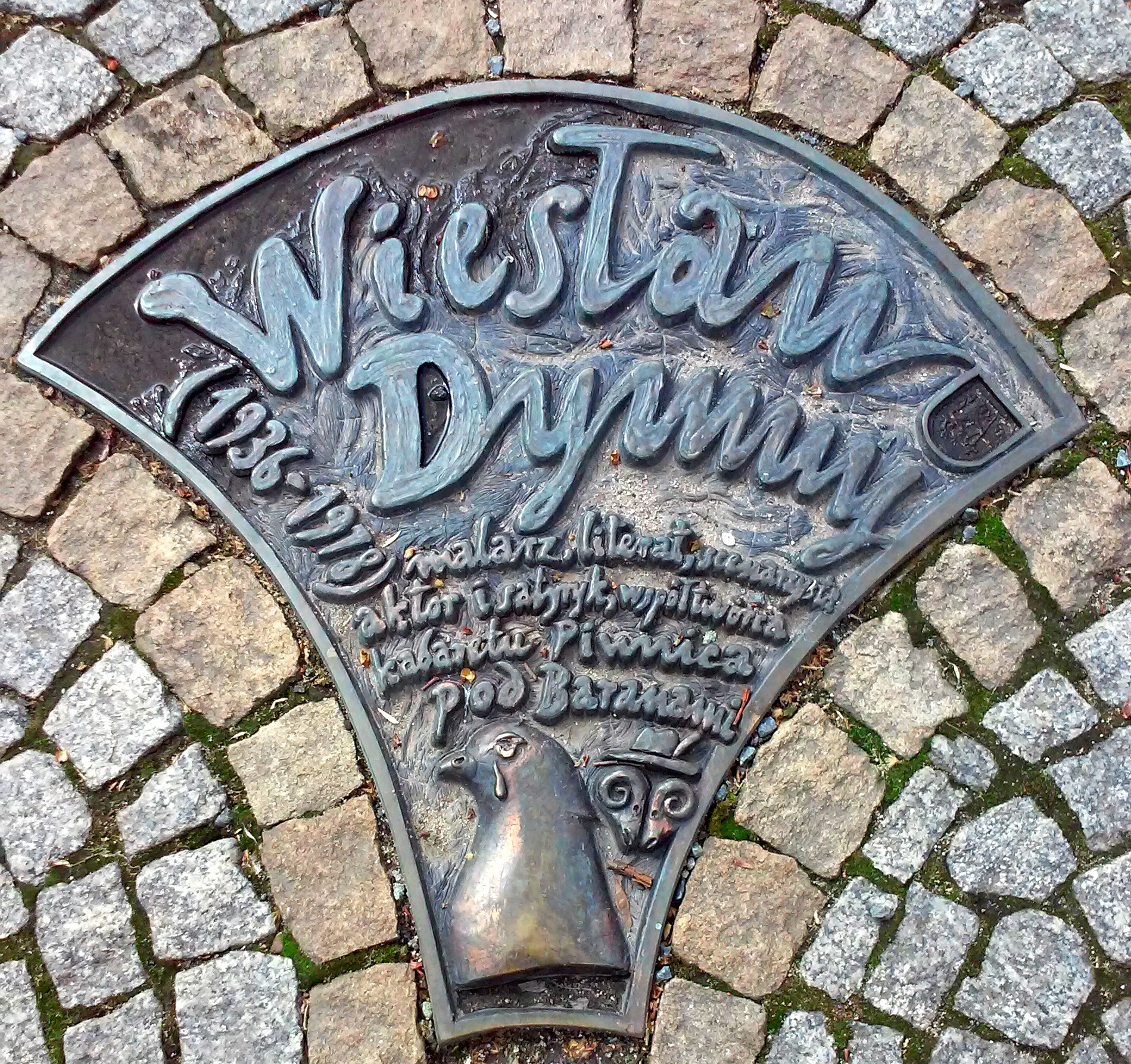 Legnica, Aleja Gwiazd Satyrykonu, tablica pamiątkowa - Wiesław Dymny